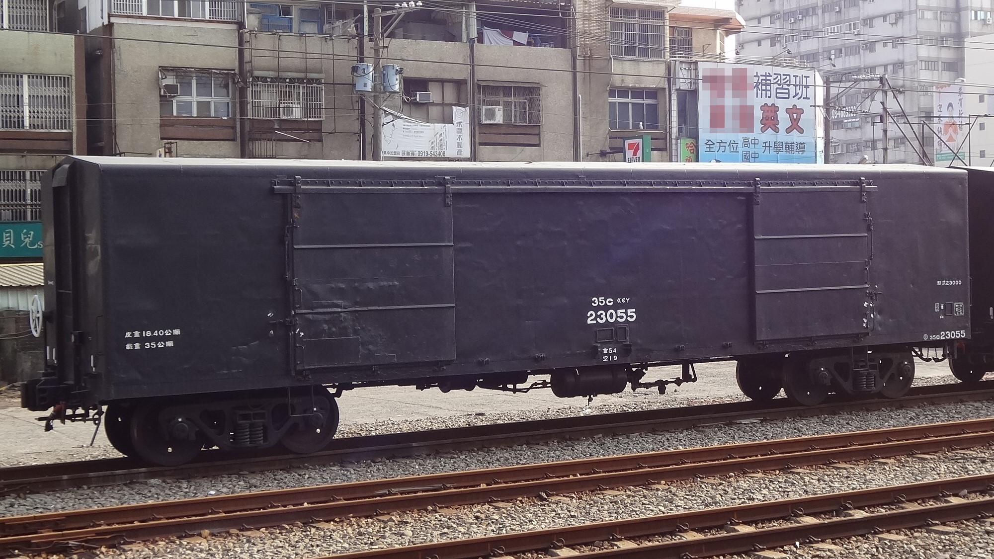 臺灣鐵路管理局35C23000型篷車35C23055。